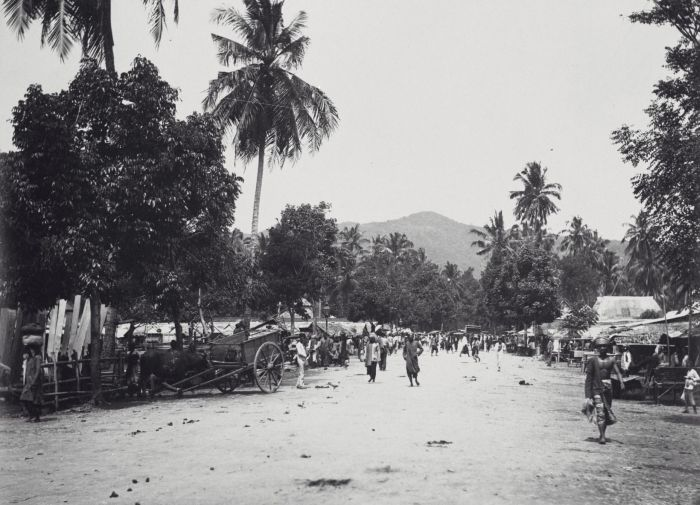 Foto. Kampong Djawa, Padang